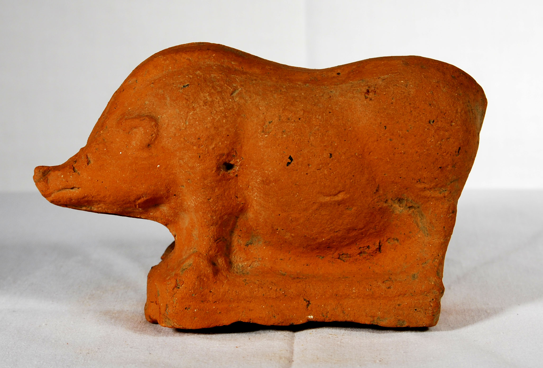 Imatge lateral de terracota que representa un porc senglar, vist de costat i buidat en la mateixa argila. Procedent de Calvi (Campania). Època hel·lenística del segle IV-II aC.